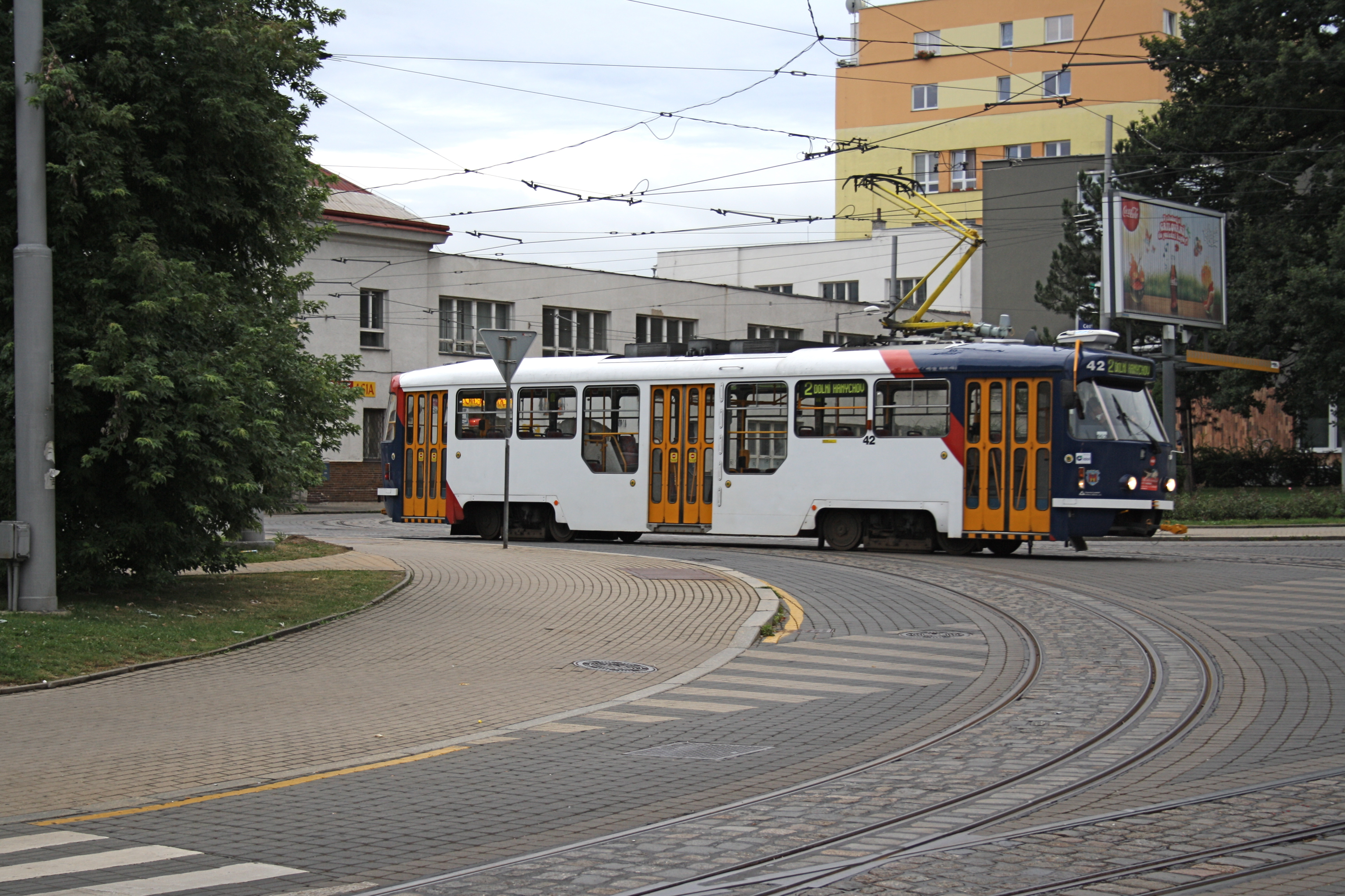 Modernisierter Straßenbahnwagen in Liberec